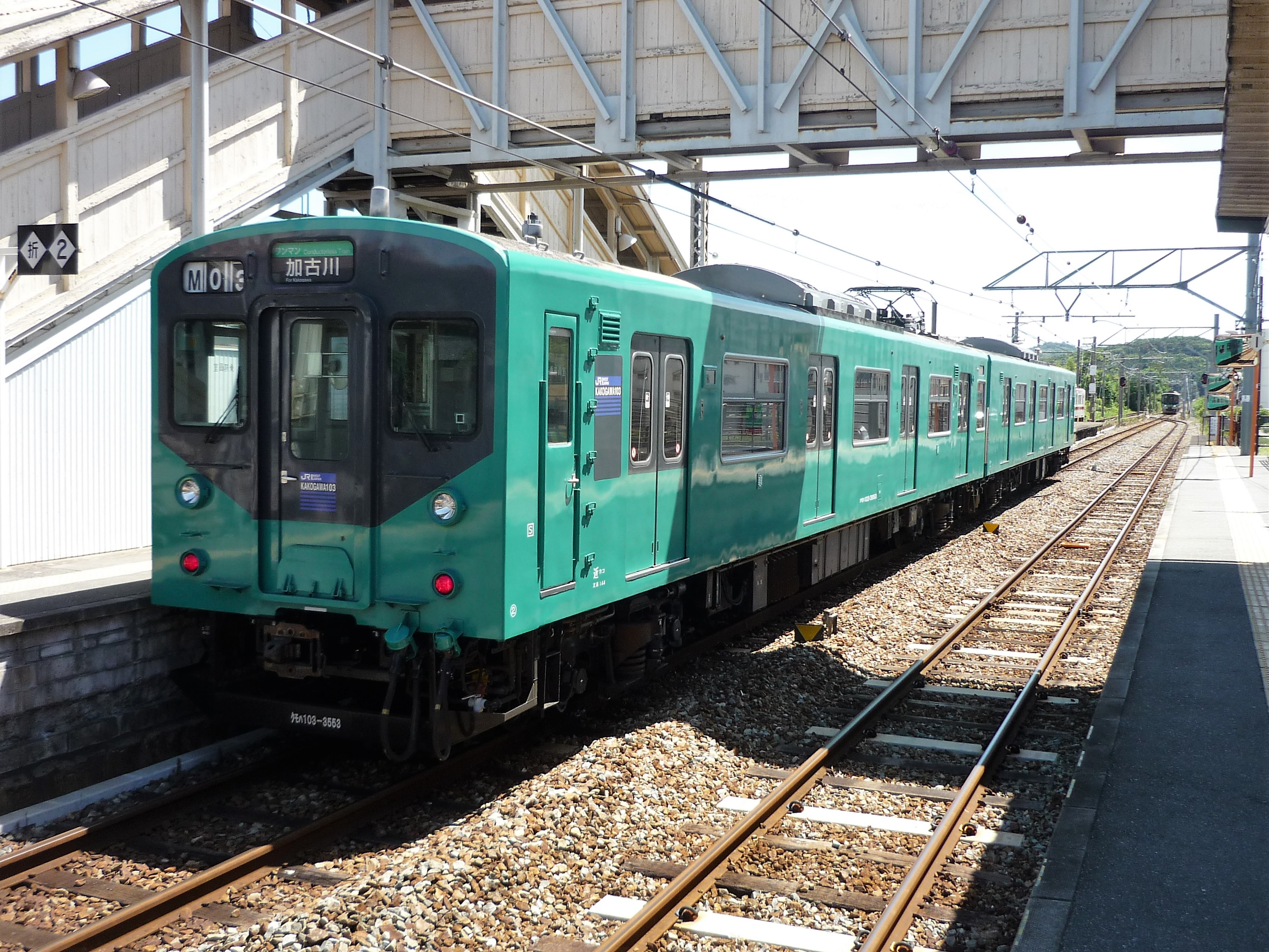 粟生駅2番線に停車中の加古川線クモハ103-3553 Panasonic Lumix DMC-FS3